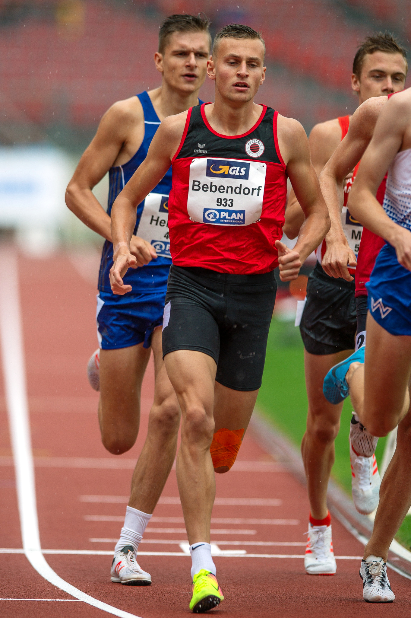 1500-Meter-Lauf,DLV,Deutsche Leichtathletik Meisterschaften 2018,Deutscher Leichtathletik-Verband,Dresdner SC 1898,Karl Bebendorf,Max-Morlock-Stadion